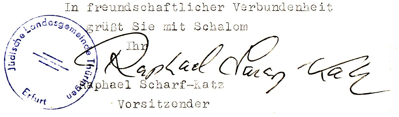 Autograph von Raphael Scharf-Katz, des Vorsitzenden der Jüdischen Landesgemeinde Erfurt